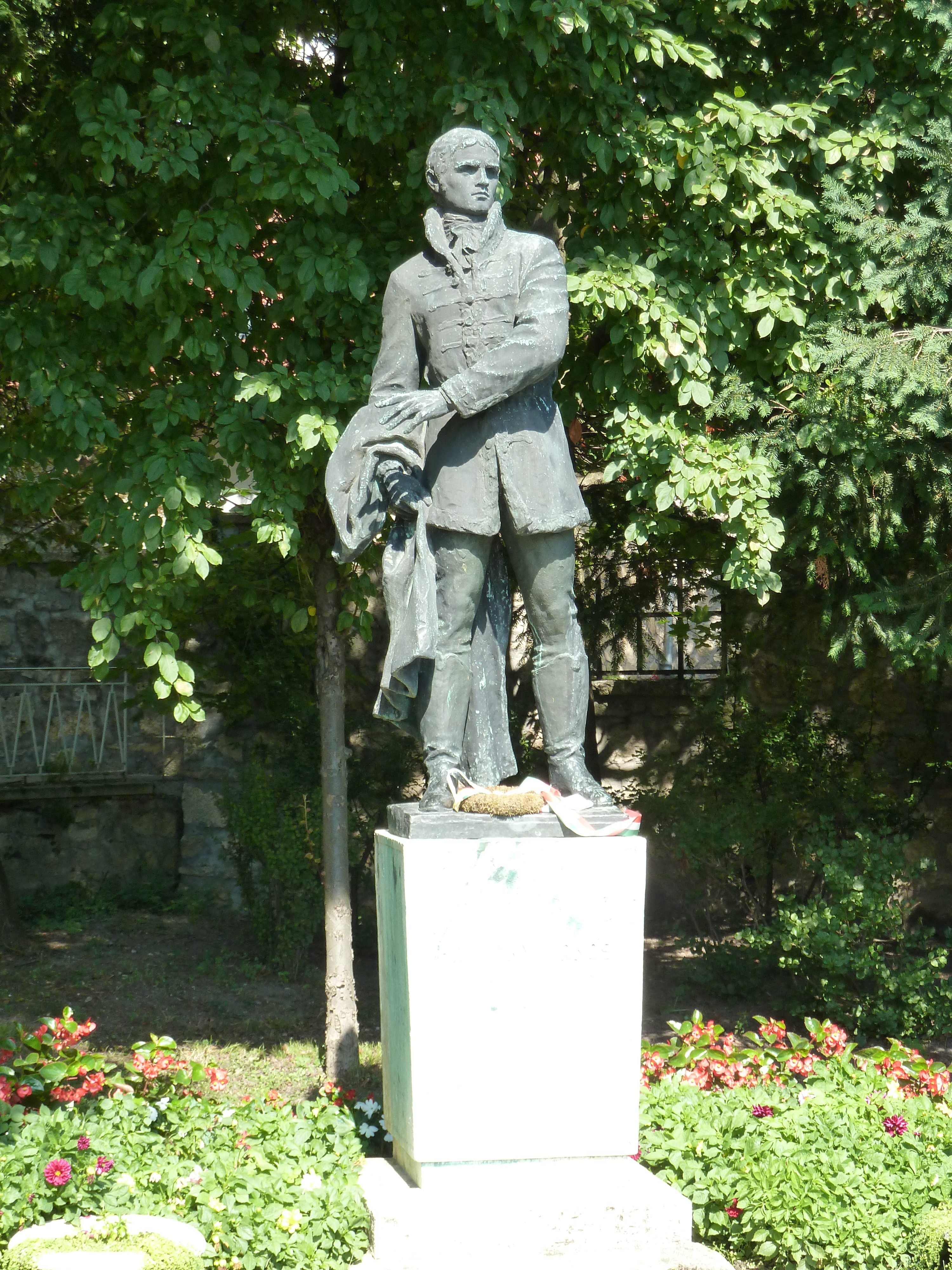 Segesdi György: Batsányi János (1960), Tapolca